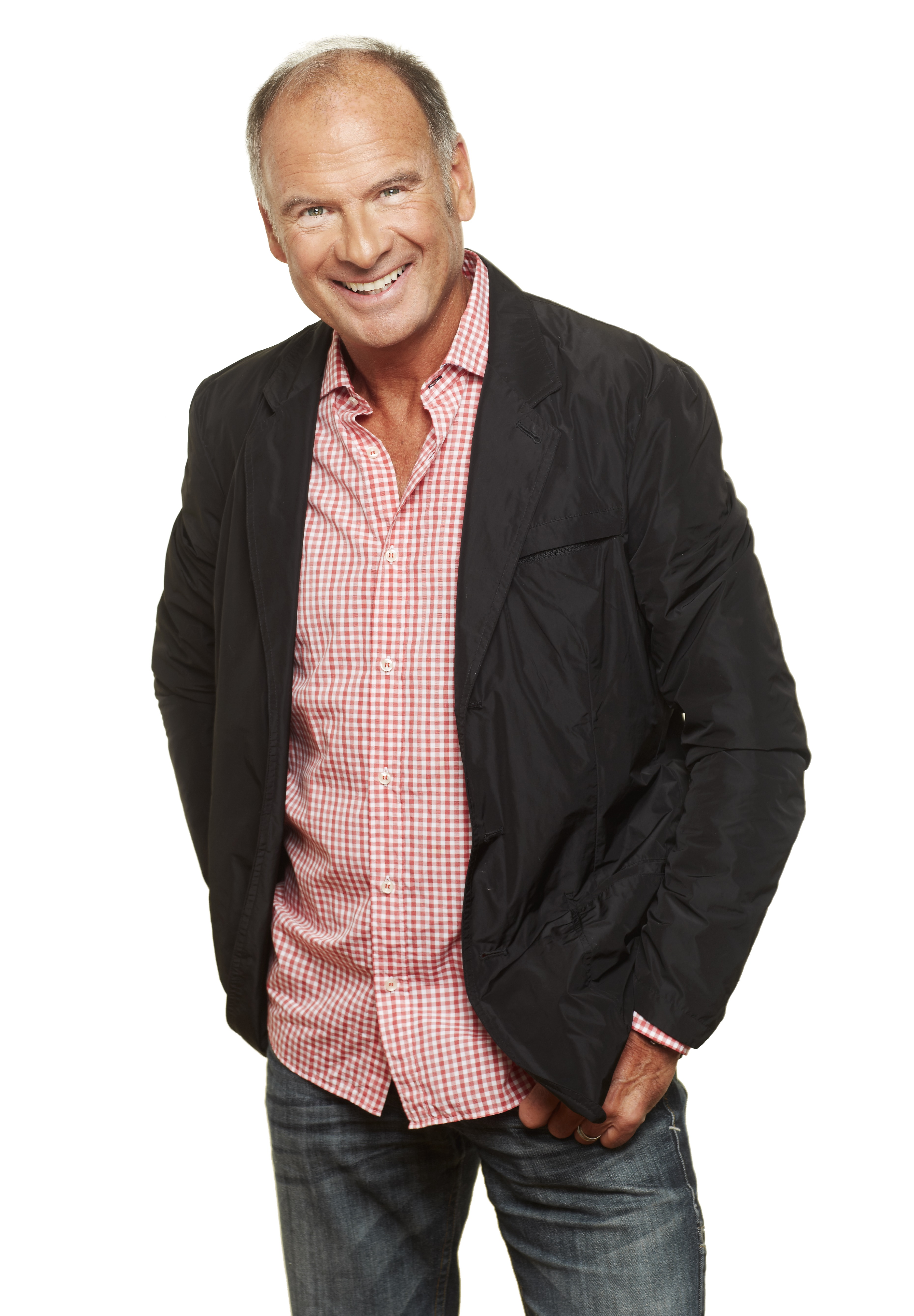 Artisten och låtskrivaren Lasse Holm.